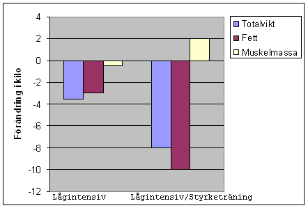 Diagram som visar fettförbränning med olika metoder.